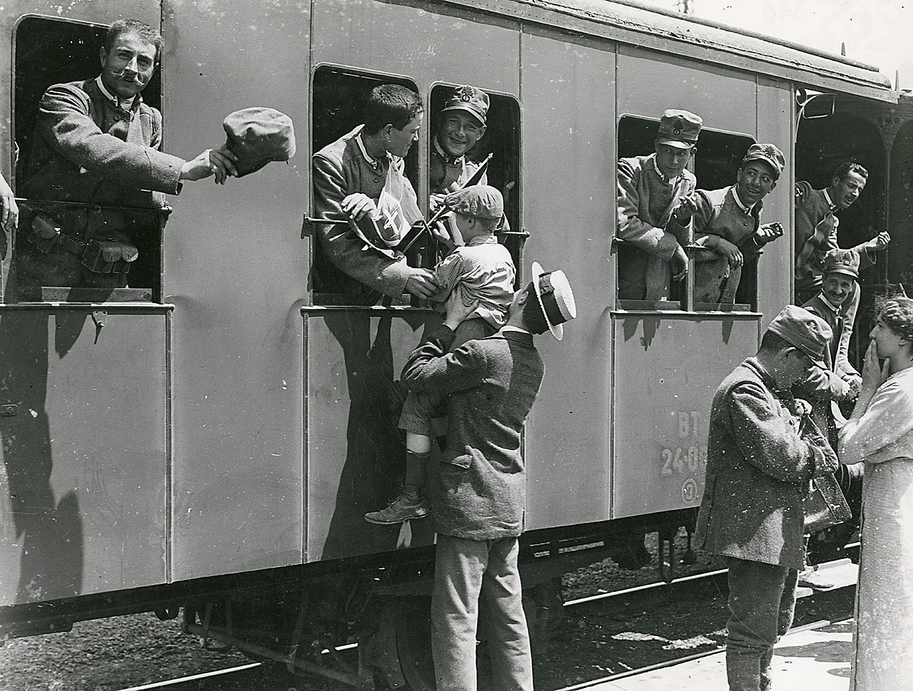 Saluto dal treno dei militari alle famiglie